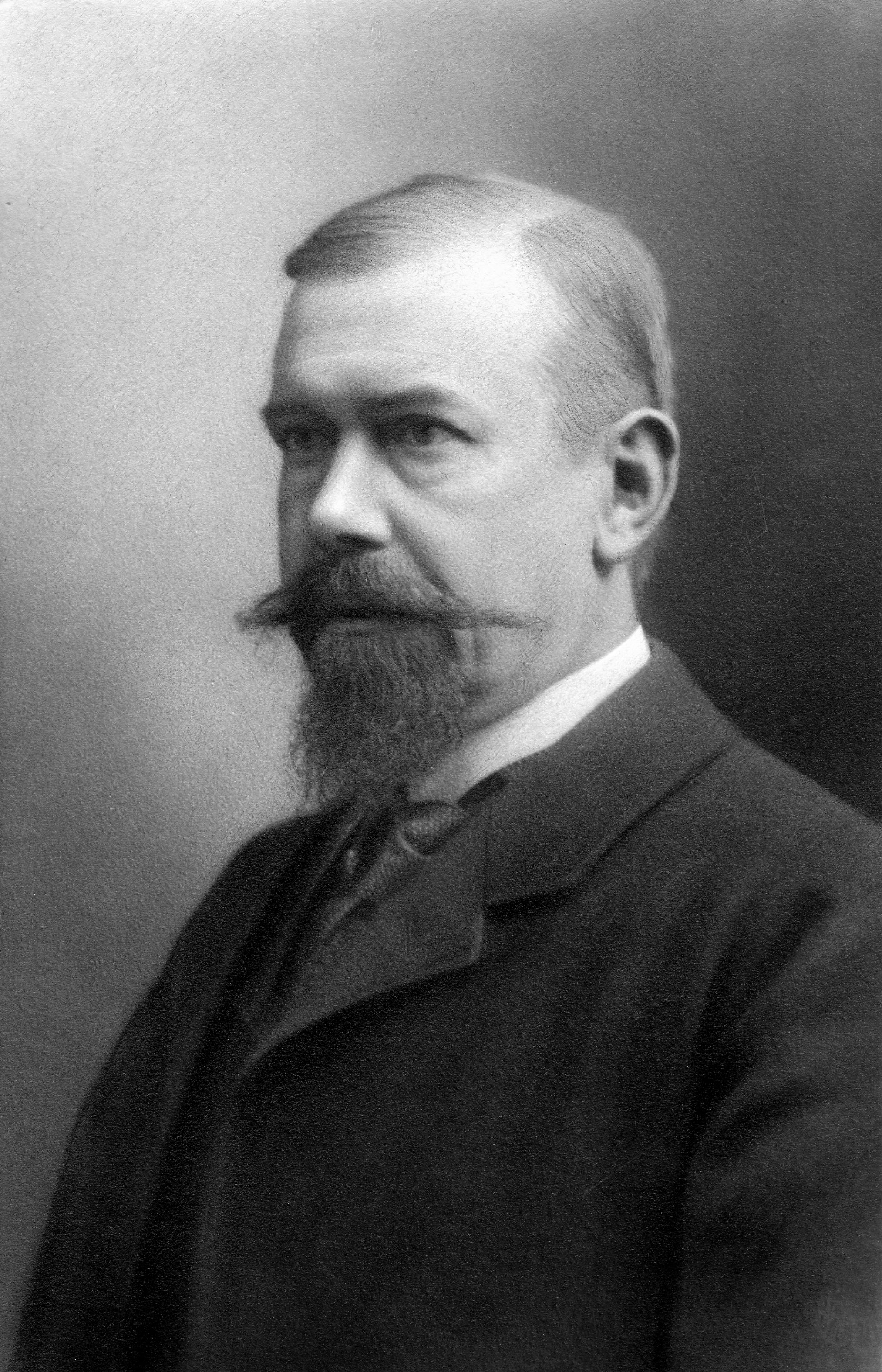 Richard Paltauf, Prof. Dr.